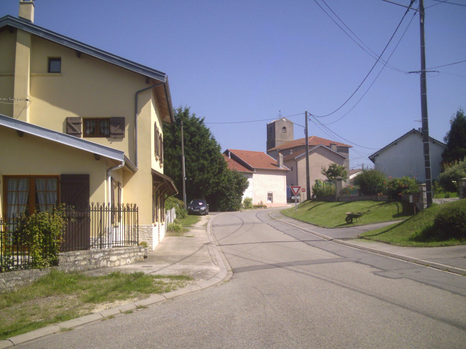 Rue de Saffais